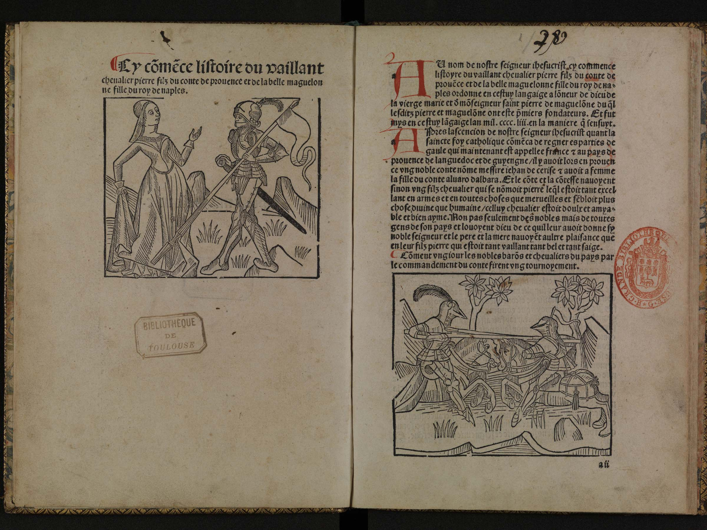 Bibliothèque municipale de Toulouse, Inc. Lyon 109